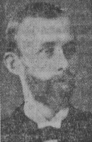 Arkitekten Frans Fredriksson